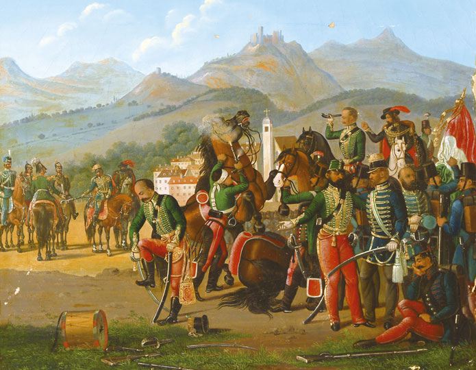 A világosi (szőlősi) fegyverletétel, 1849